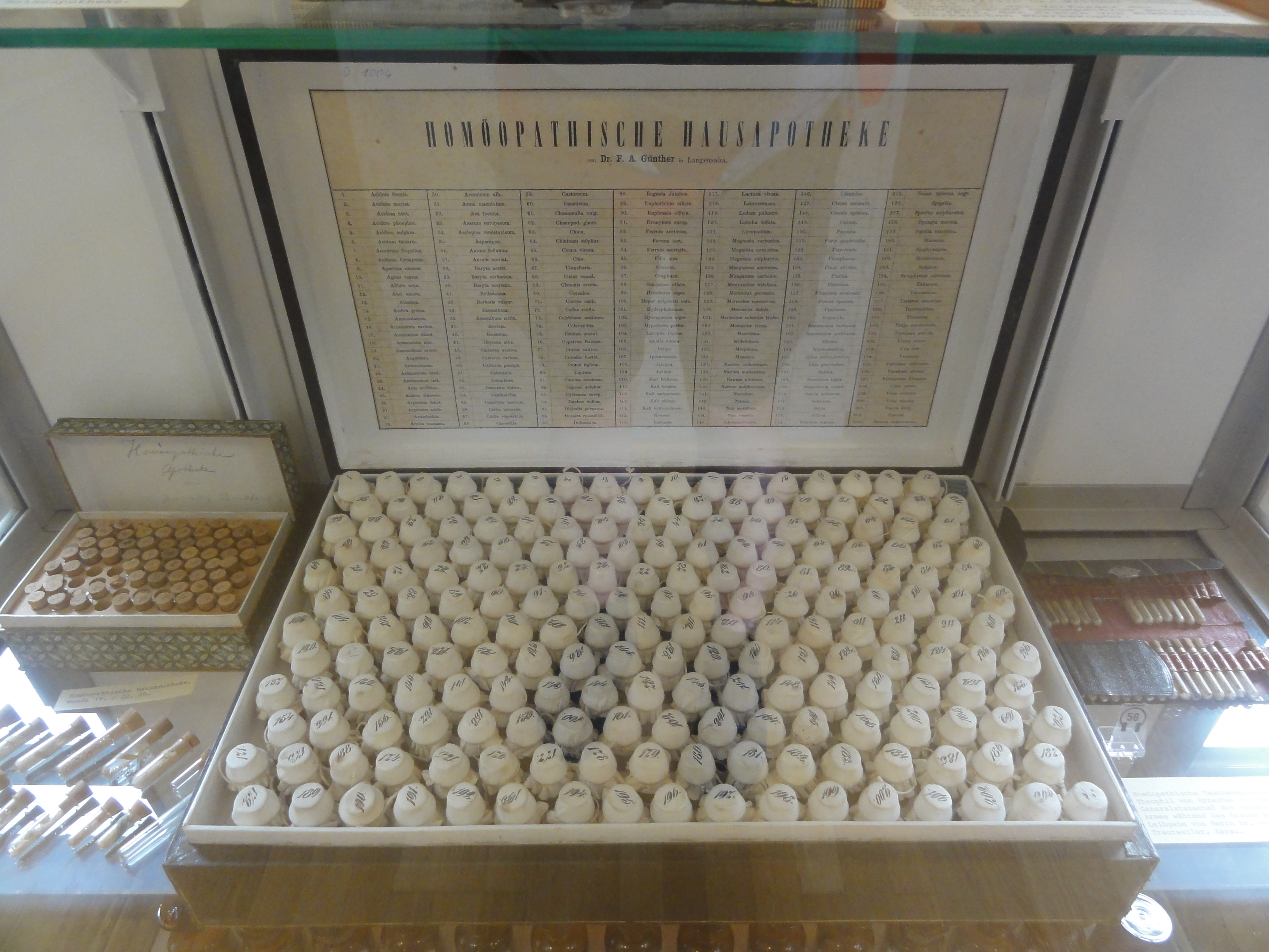 Basel — Pharmazie-Historisches Museum der Universität